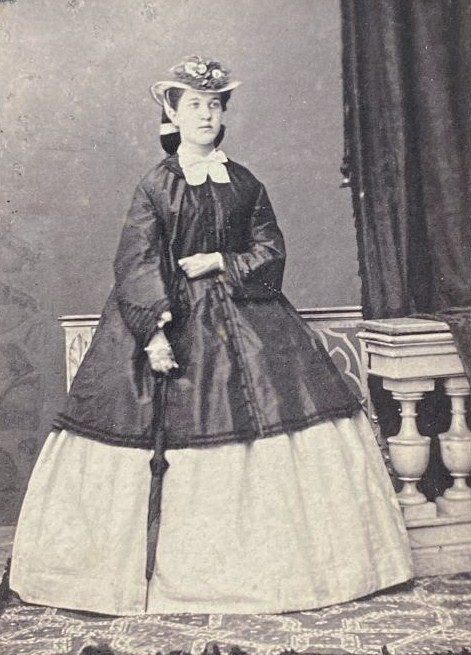 Мария (Магдалина) Петровна Свистунова (1848— ?)